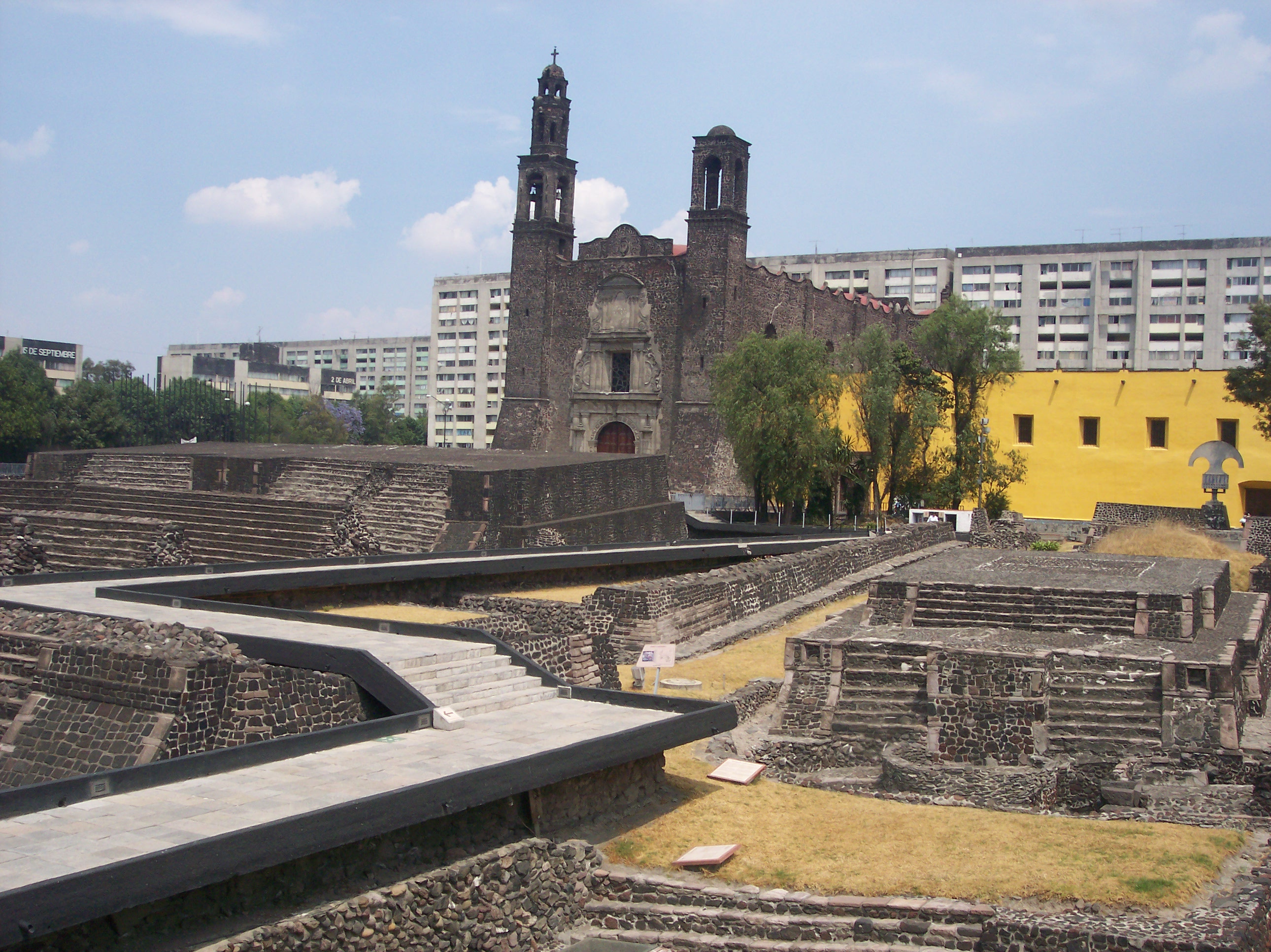 PLAZAS DE LAS TRES CULTURAS